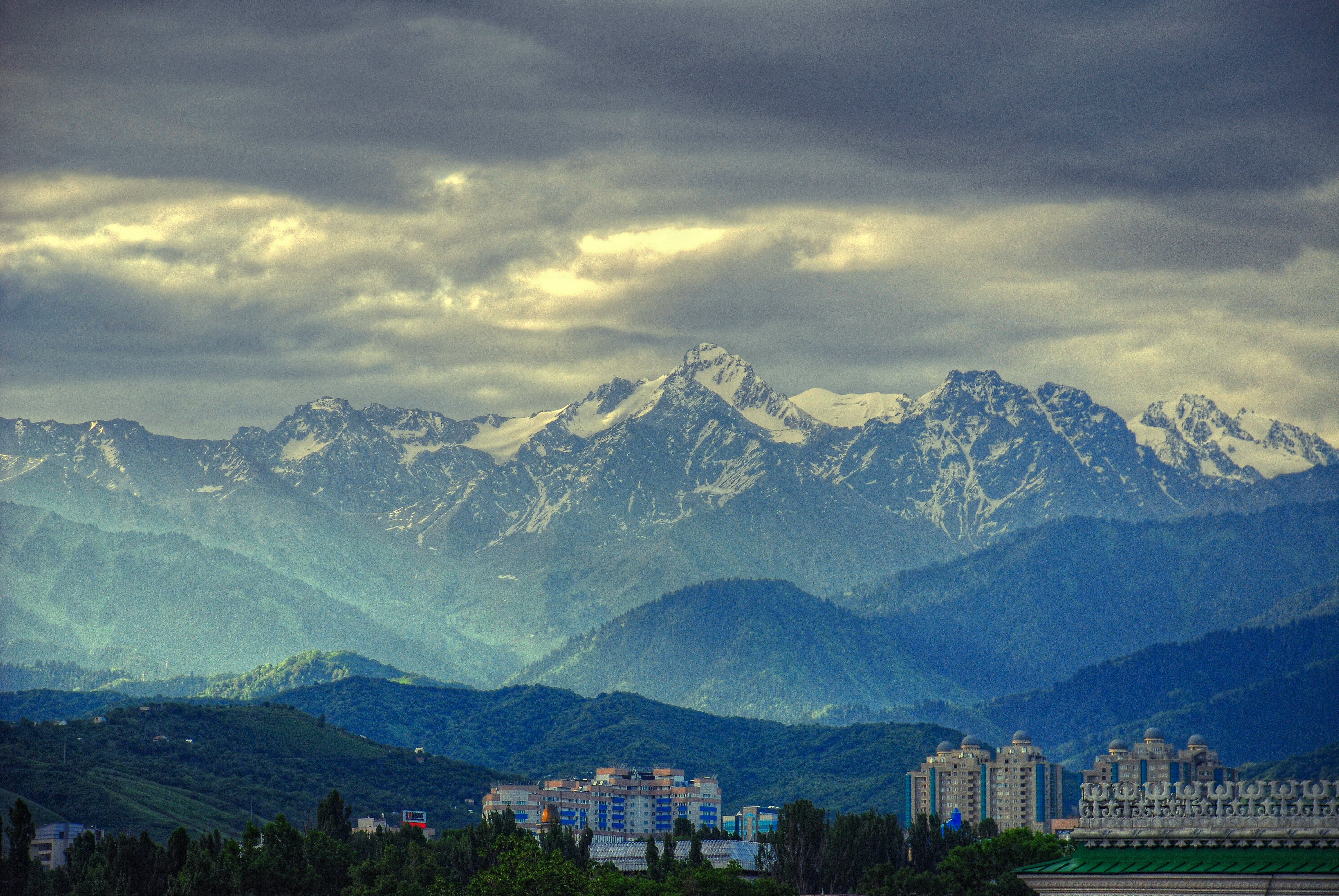 Kazakhstan, Central Asia